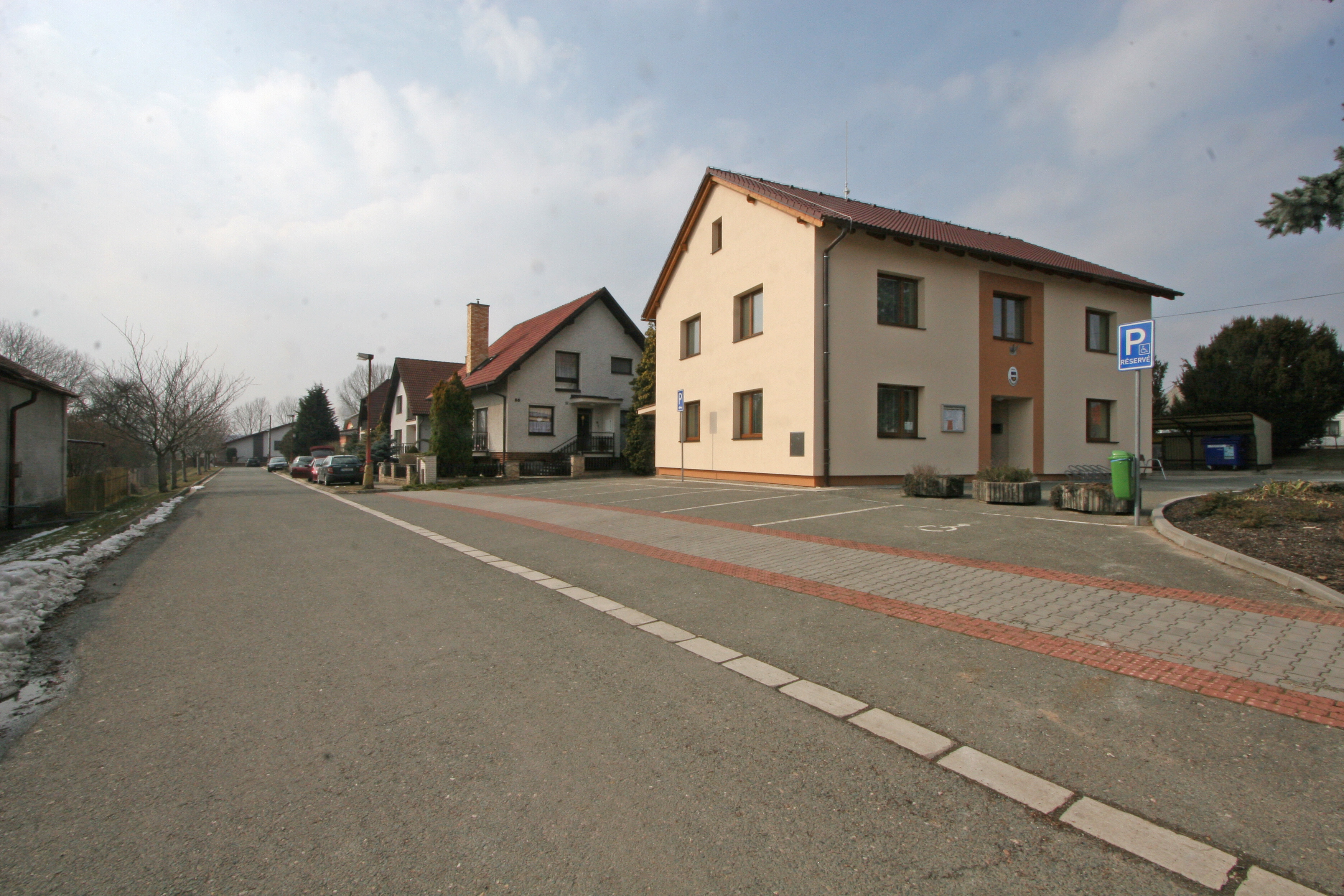 Mokrovousy obecní úřad